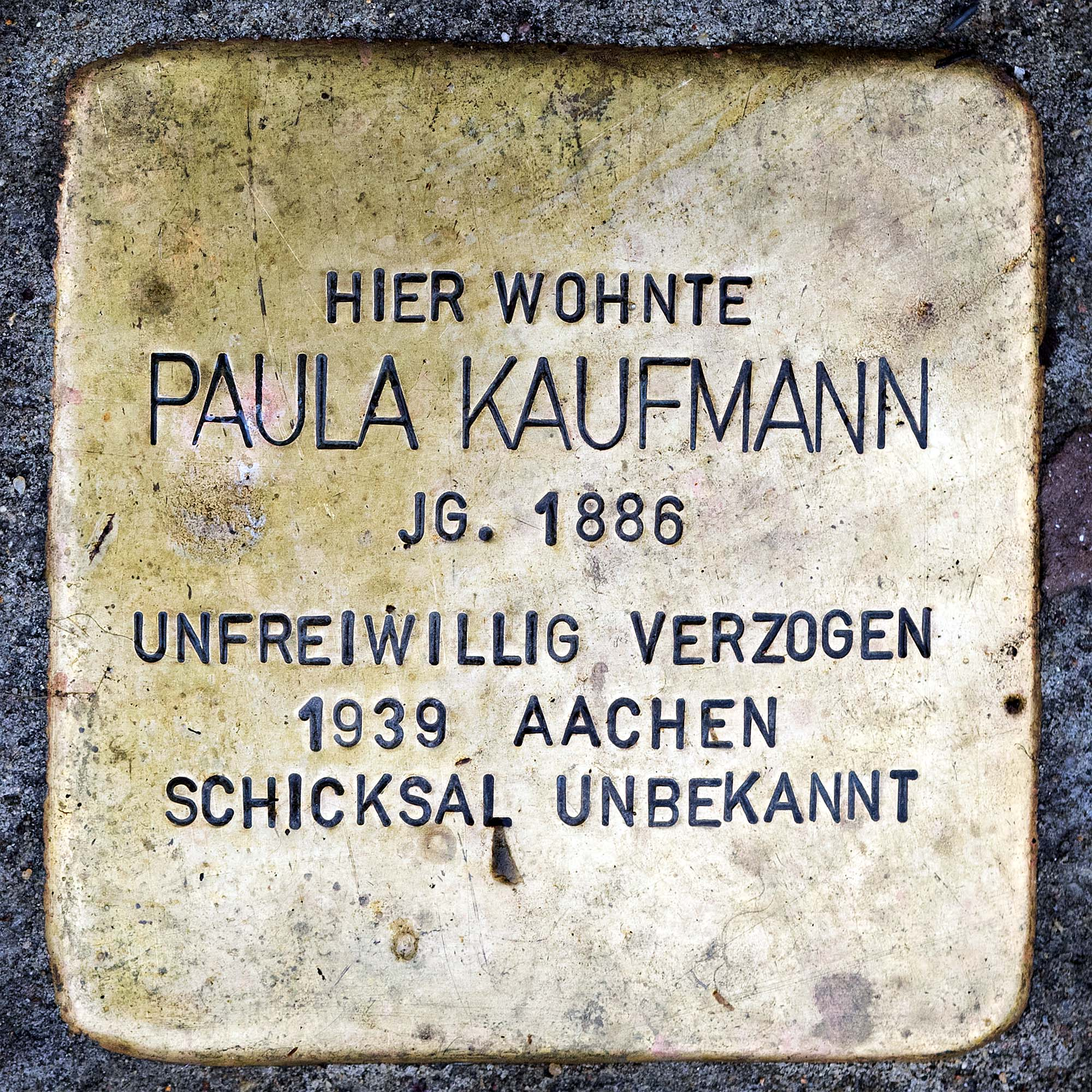 Stolperstein für Kaufmann Paula